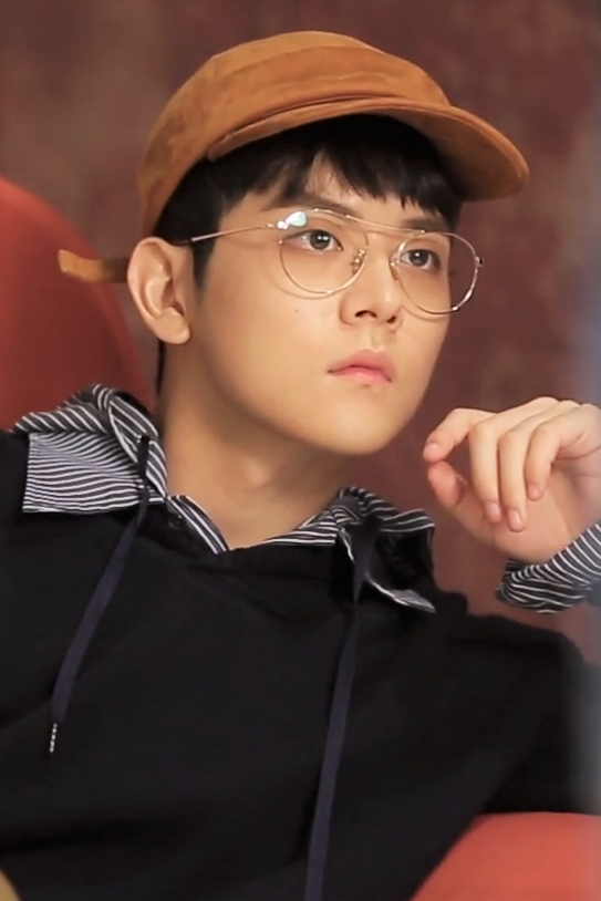 [TV텐] 텐스타 11월호 커버는 가을을 닮은 배우 여회현! 분위기가 폭발하는 여회현의 촬영 현장, 비하인드 영상을 통해 확인하세요!